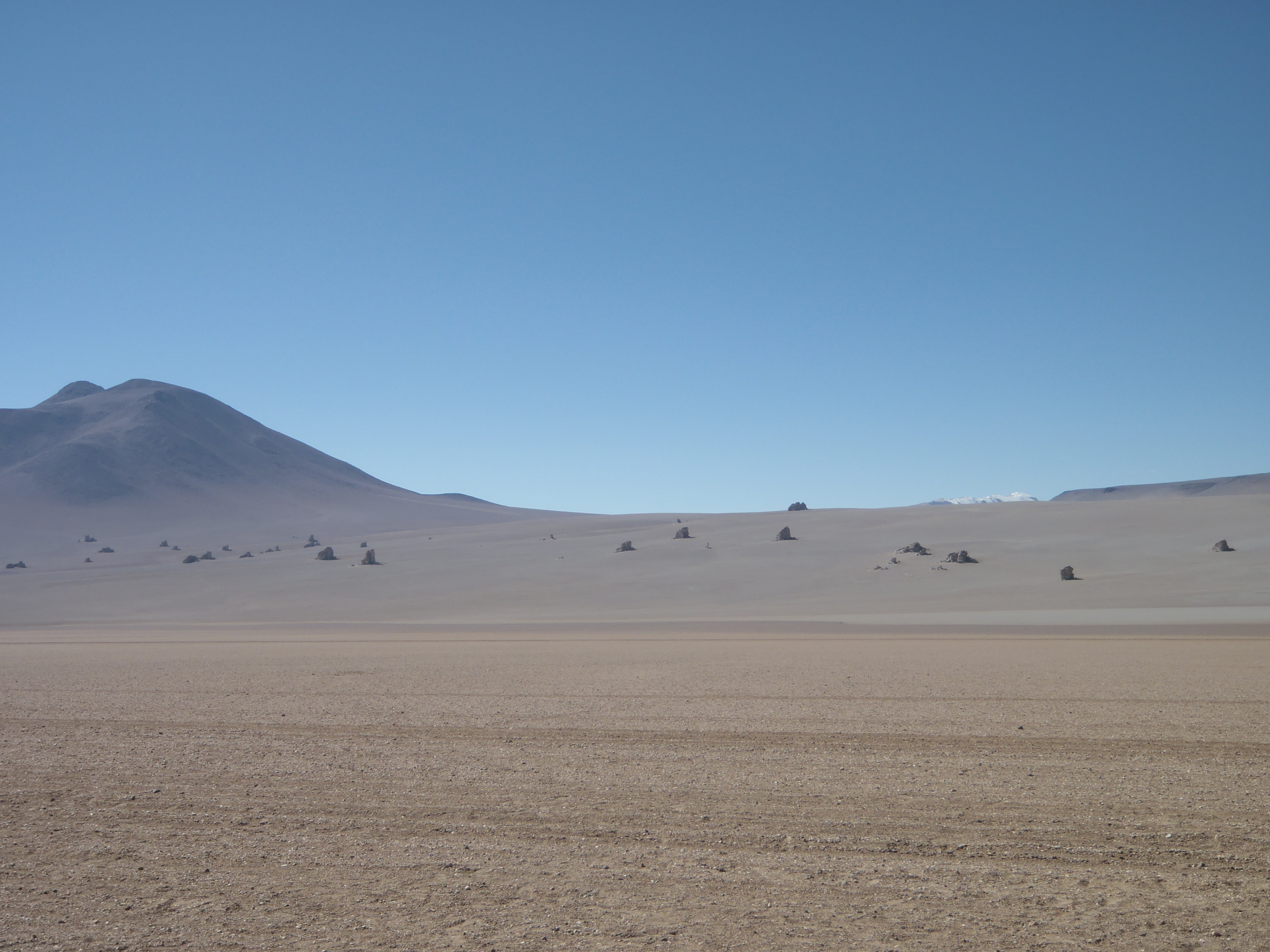 Désert de Dali, Siloli, sud de la Bolivie